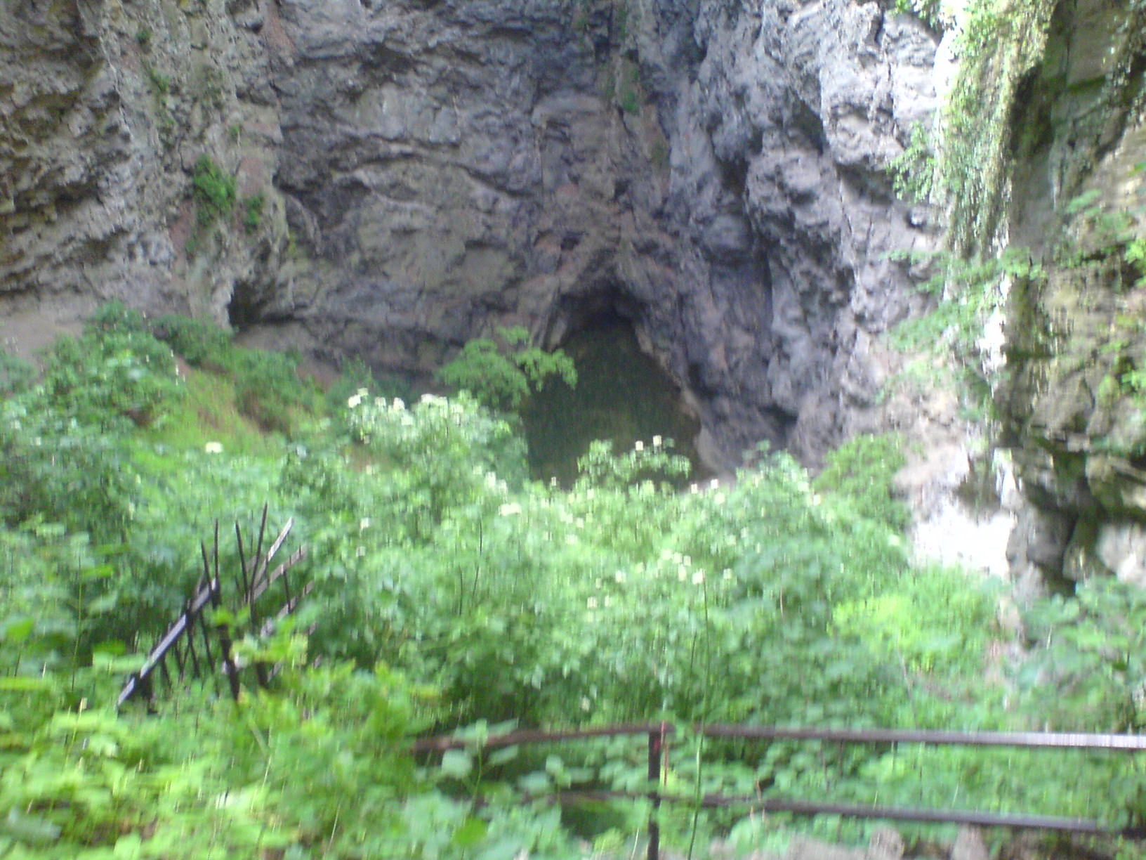 Propast v Hranicích na Moravě- nejhlubší propast na Morave a ve střední evropě